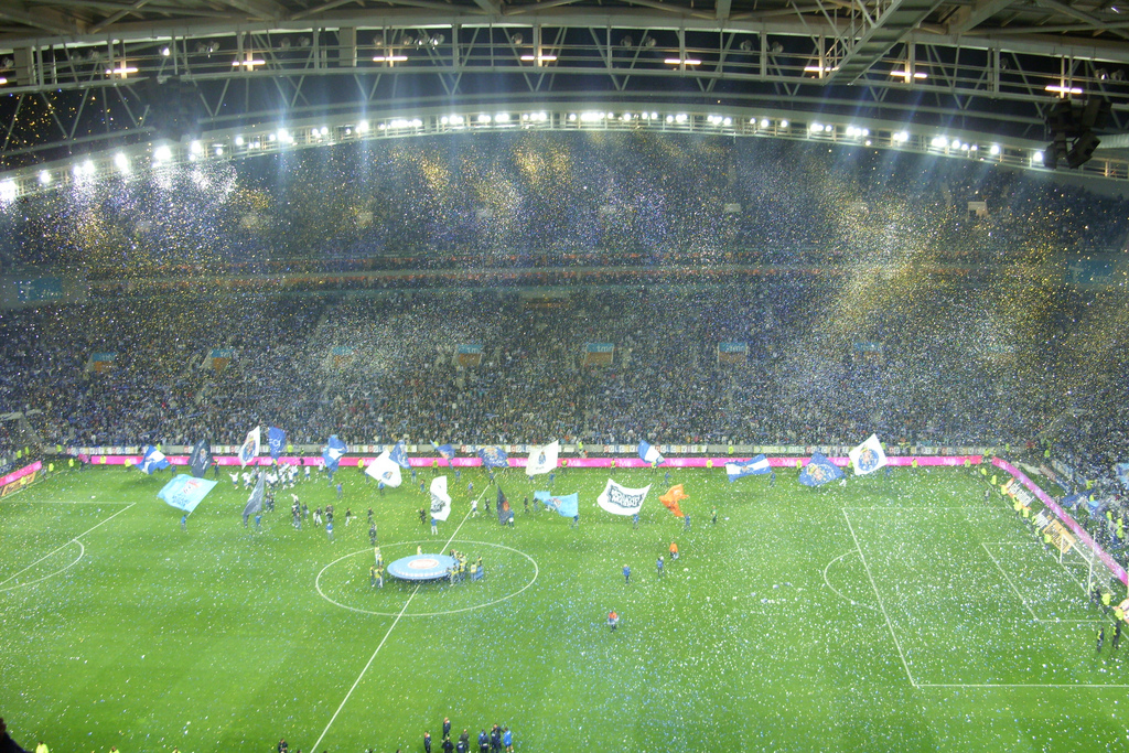 Tetra 005